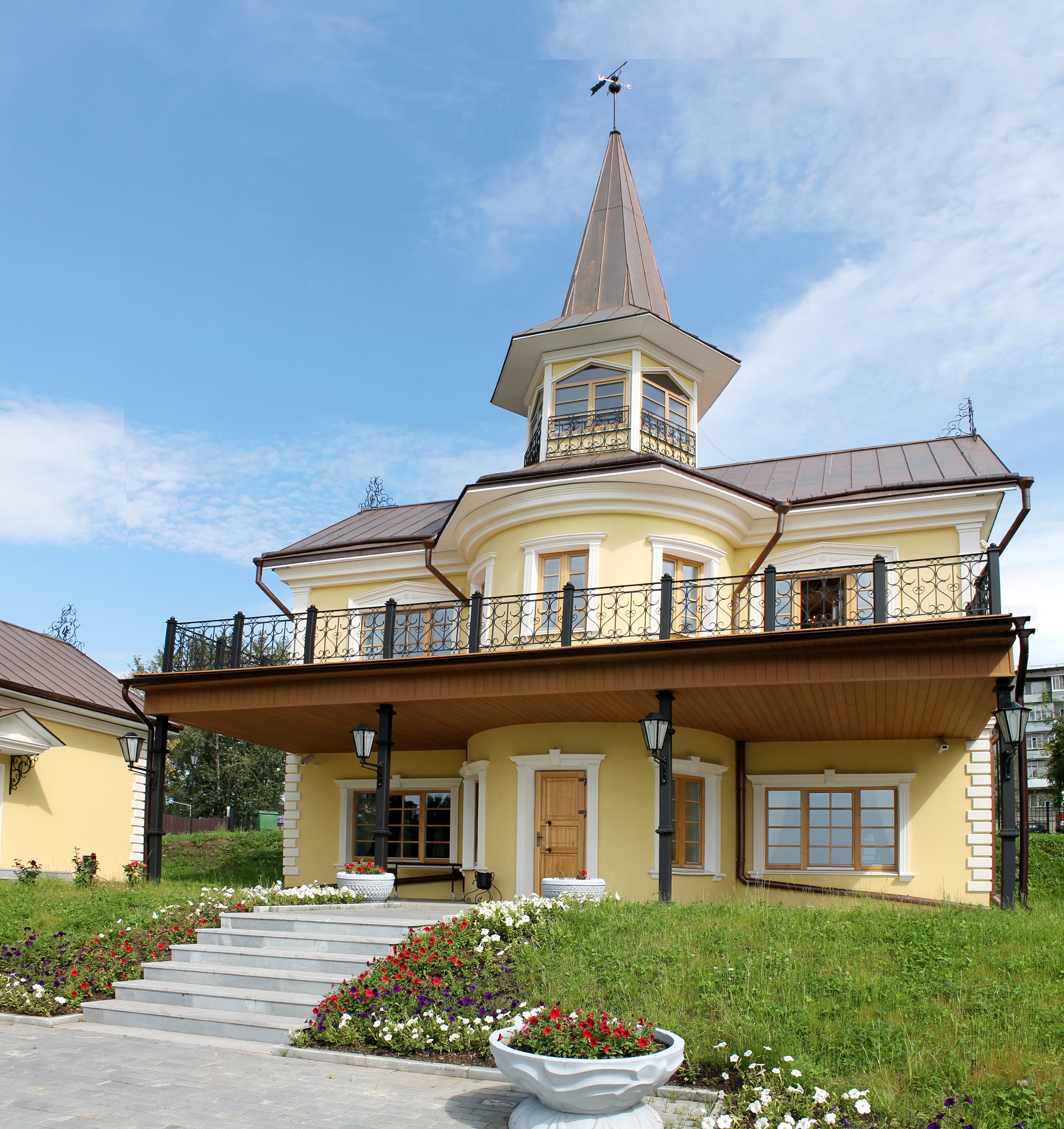 Дача горного инженера Ф.И.Швецова проект - 1840-е гг., воссоздана в камне в 2013 г. Нижний Тагил, улица Красногвардейская, 5